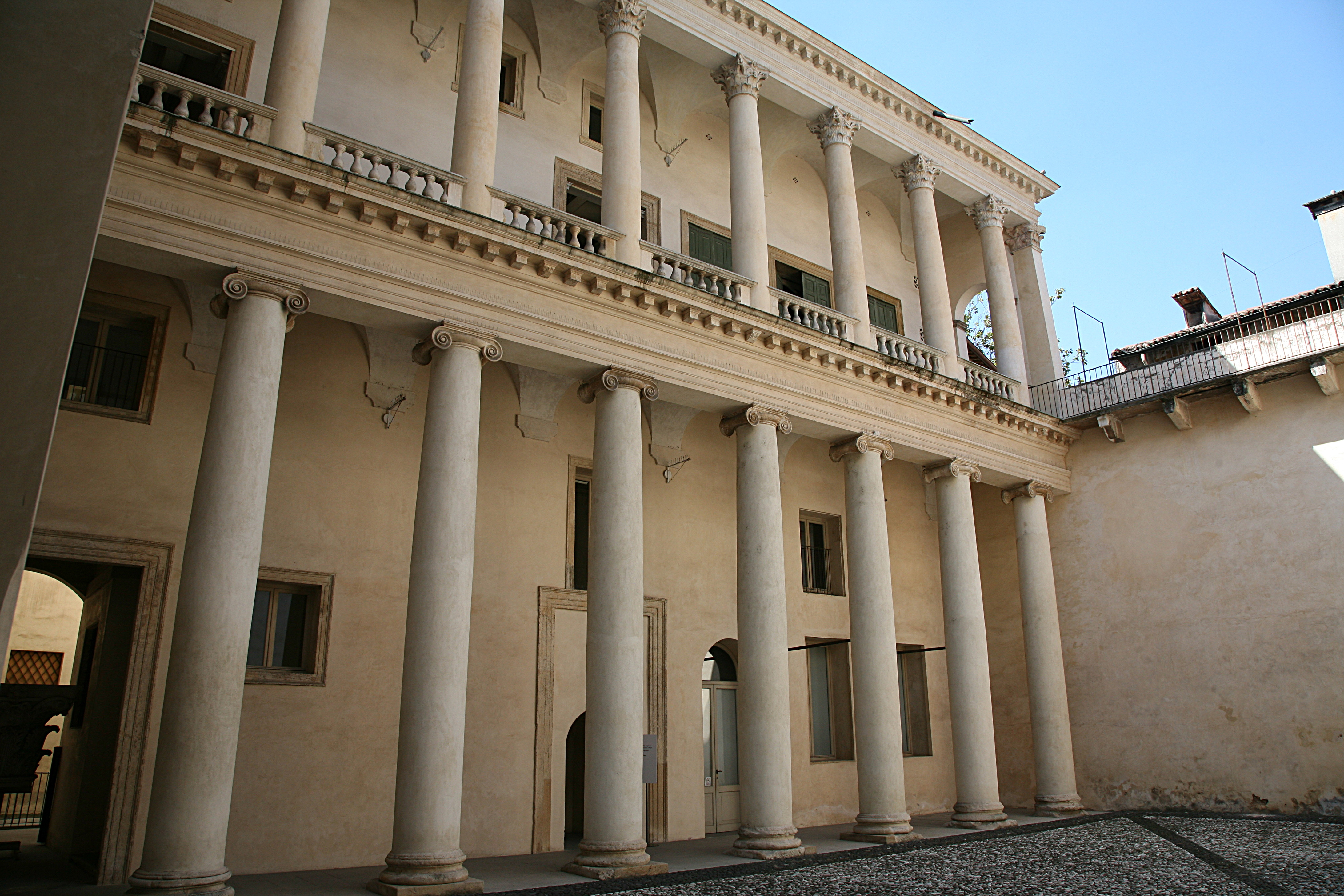 Palazzo Barbaran Da Porto in Vicenza